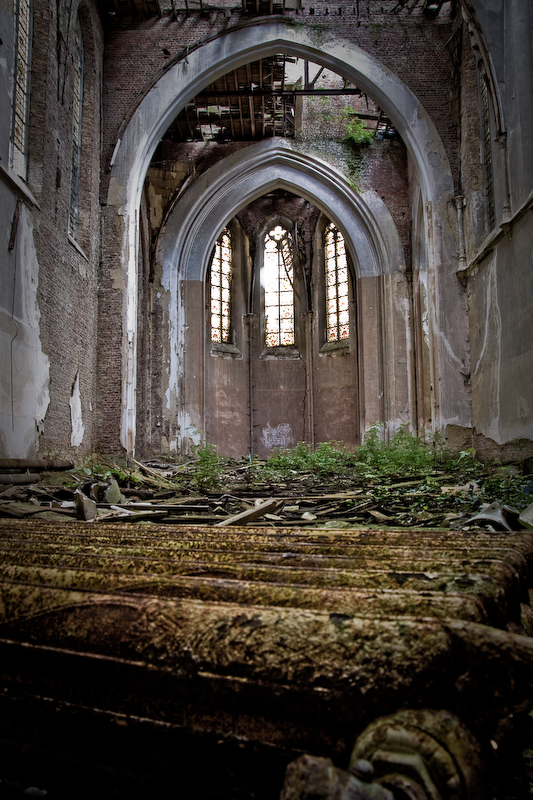 Kasteel van Mesen, Lede, Belgium (13 of 19)